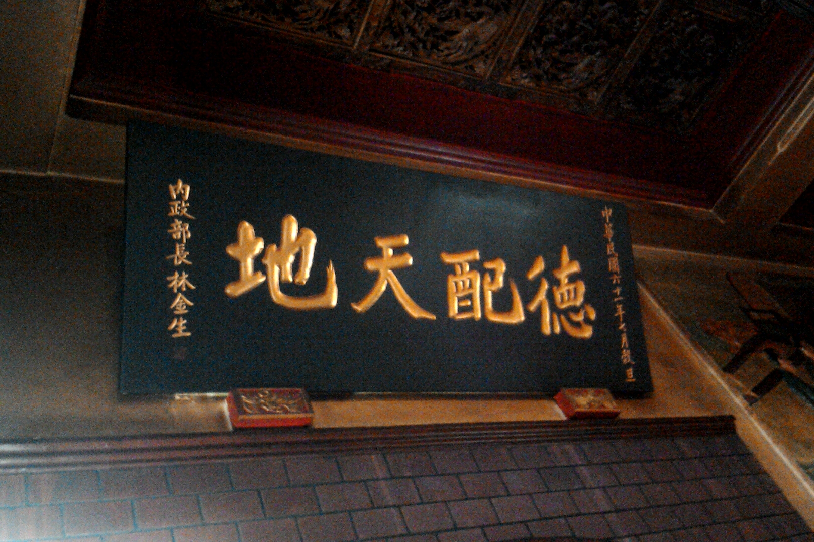 桃園文昌宮內政部部長林金生贈匾,桃園市桃園區市中次分區文昌里